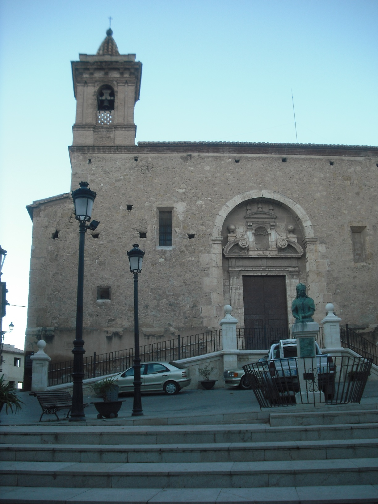 Església de Sant Martí.